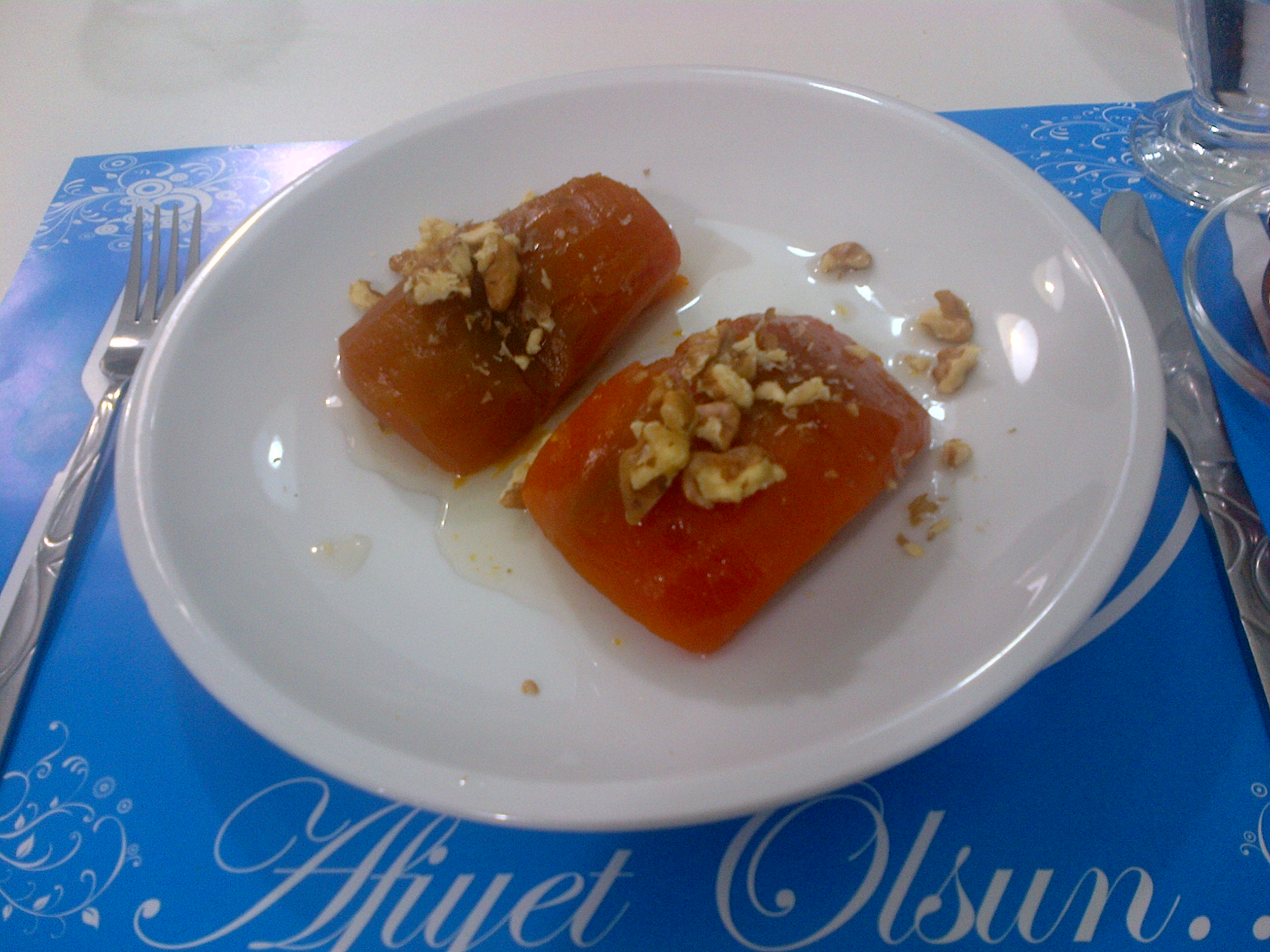 Kabak tatlısı amb nous.